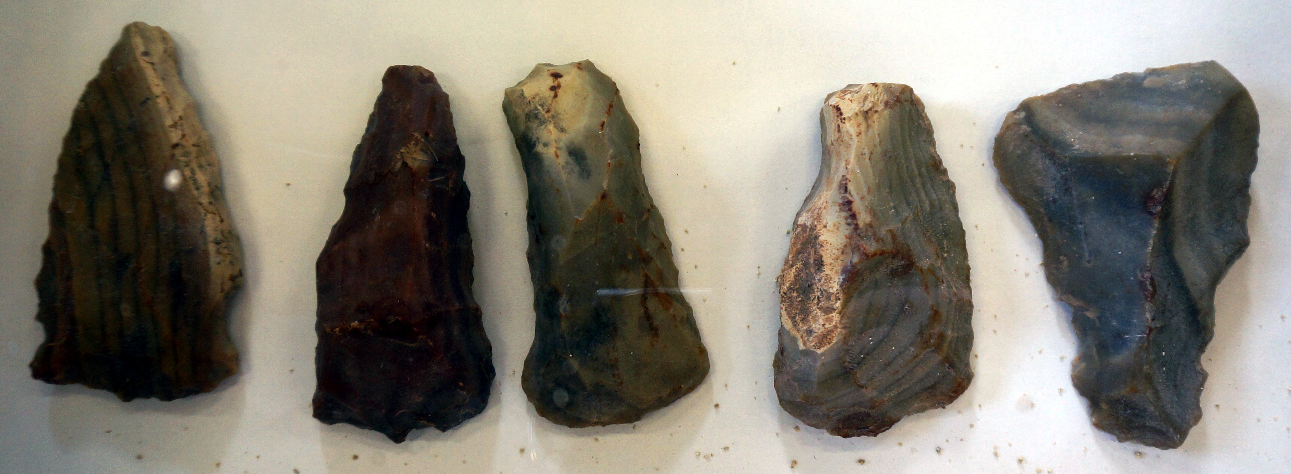 présenté au musée de Pons.